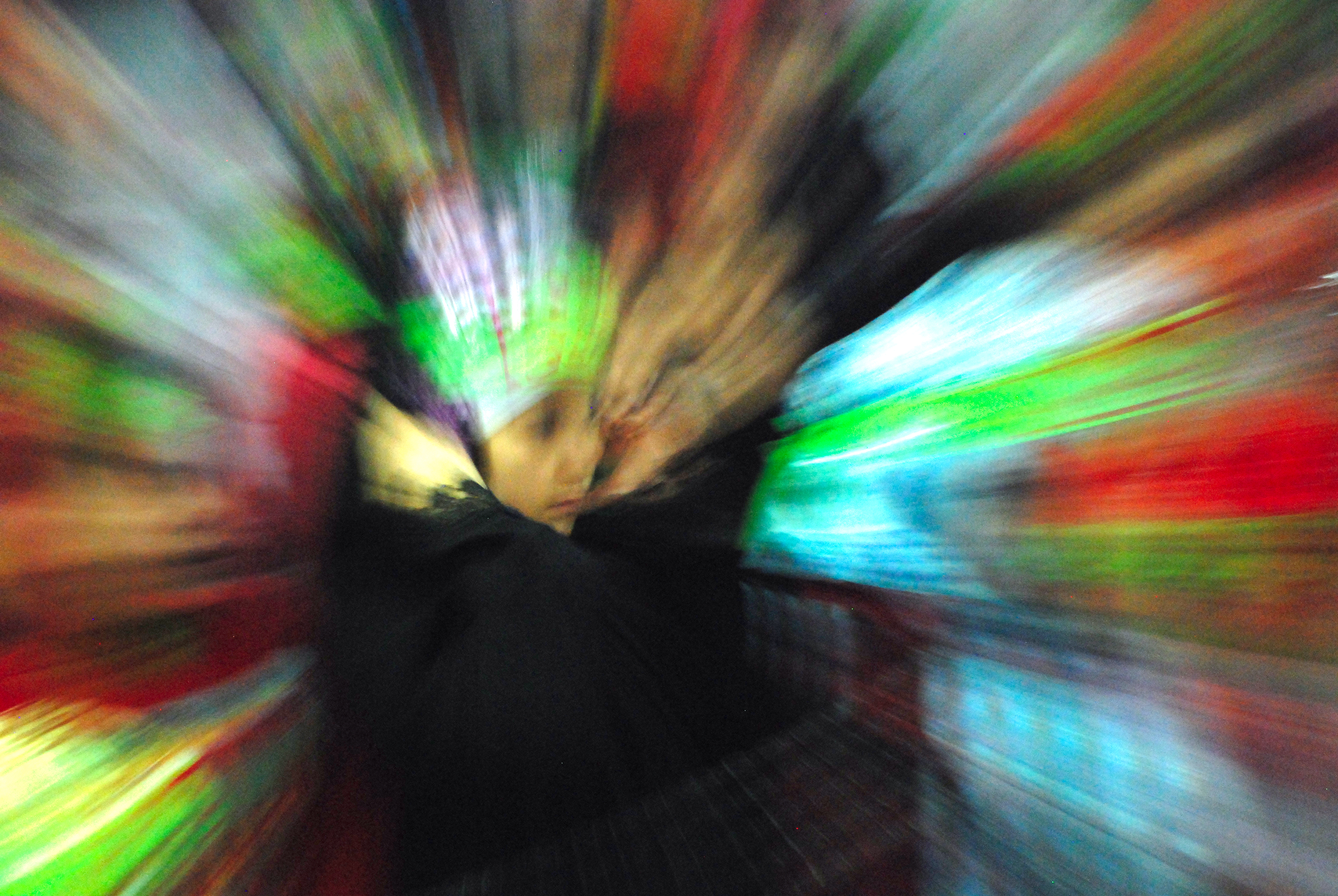 مراسم شهادت حضرت رقیه - مصلای شهرقدس عکاس: علیرضا حبیبی